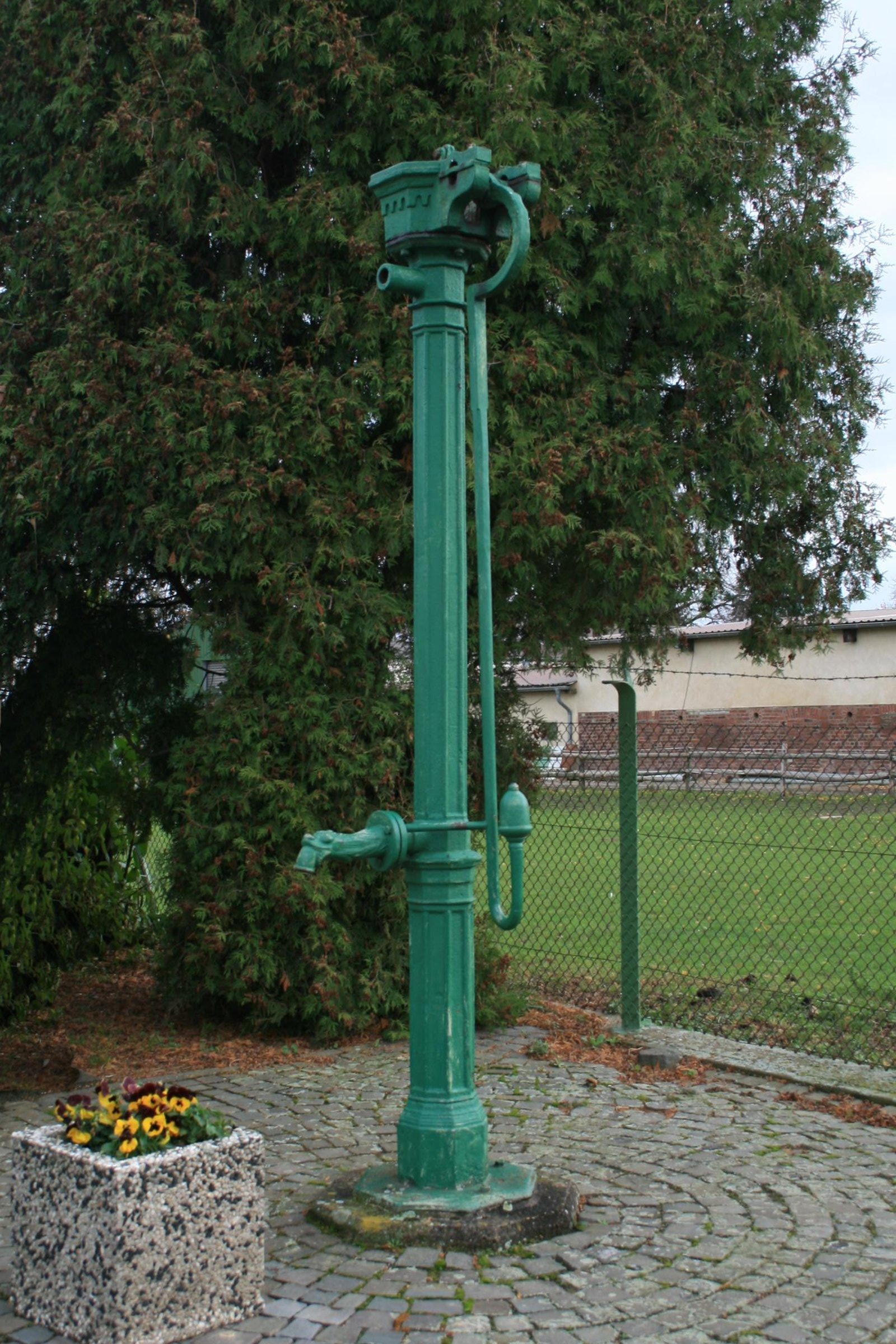 Eine der alten Dorfwasserpumpen in Nörvenich-Eschweiler über Feld, Ecke Buntwolfstr./Am Ringsheimer Hof